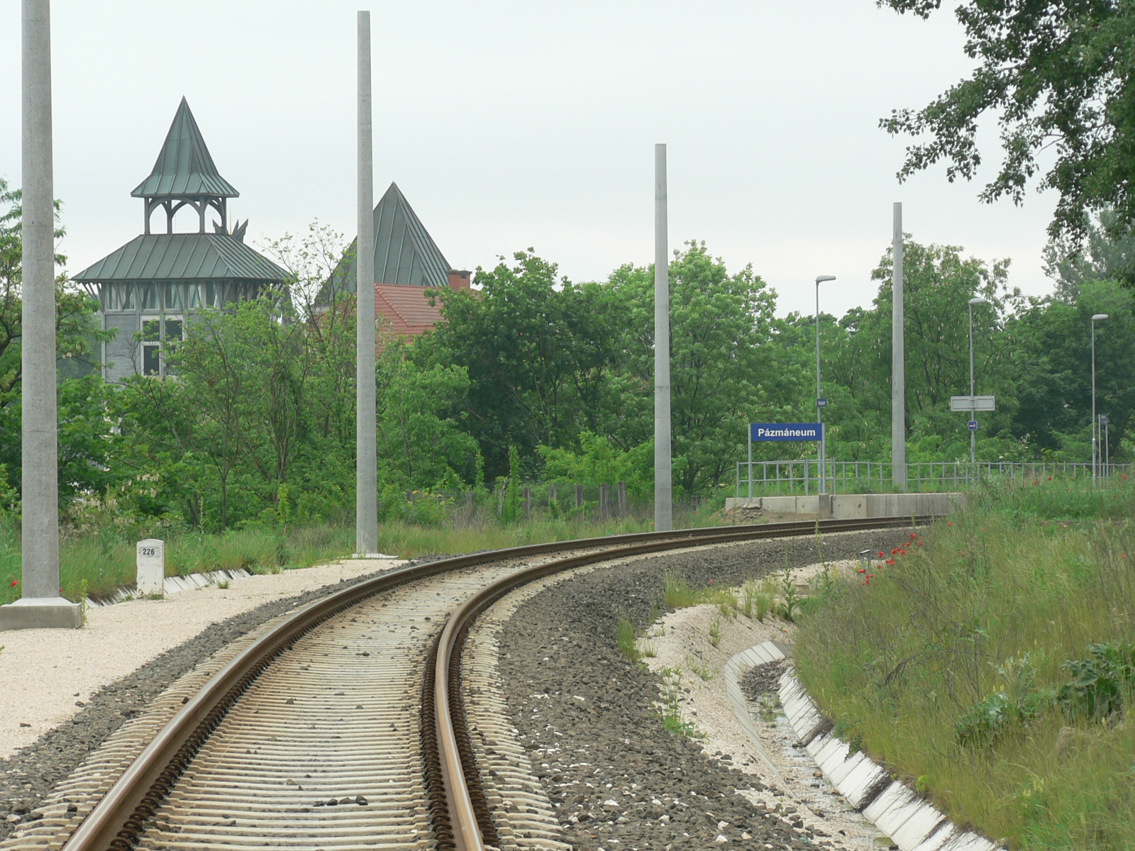 A Pázmáneum megállóhely bejárati kanyarja egyetemi épületekkel